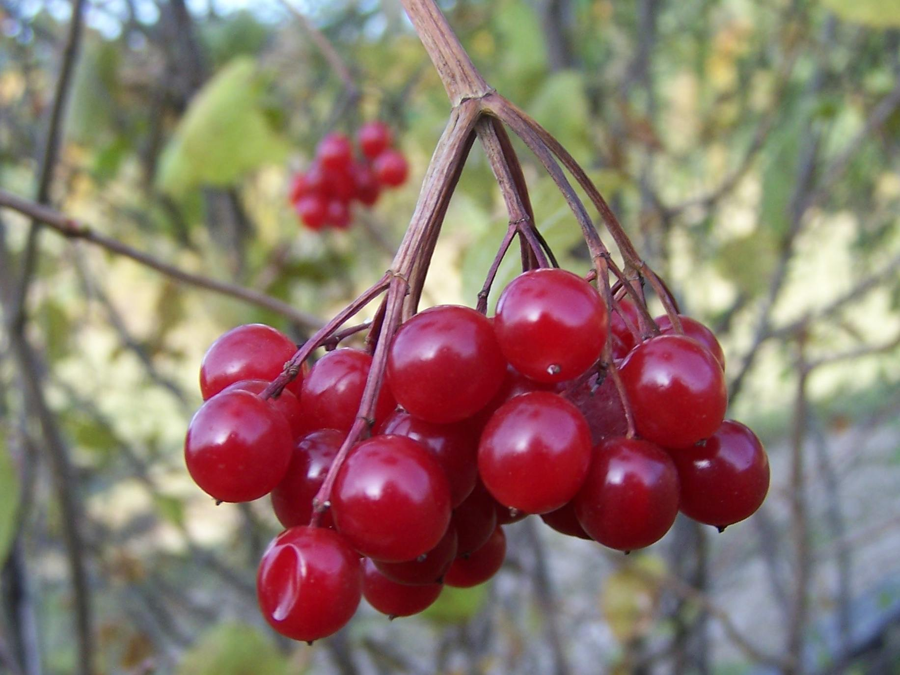 Viburnum opulus (pl. kalina koralowa)